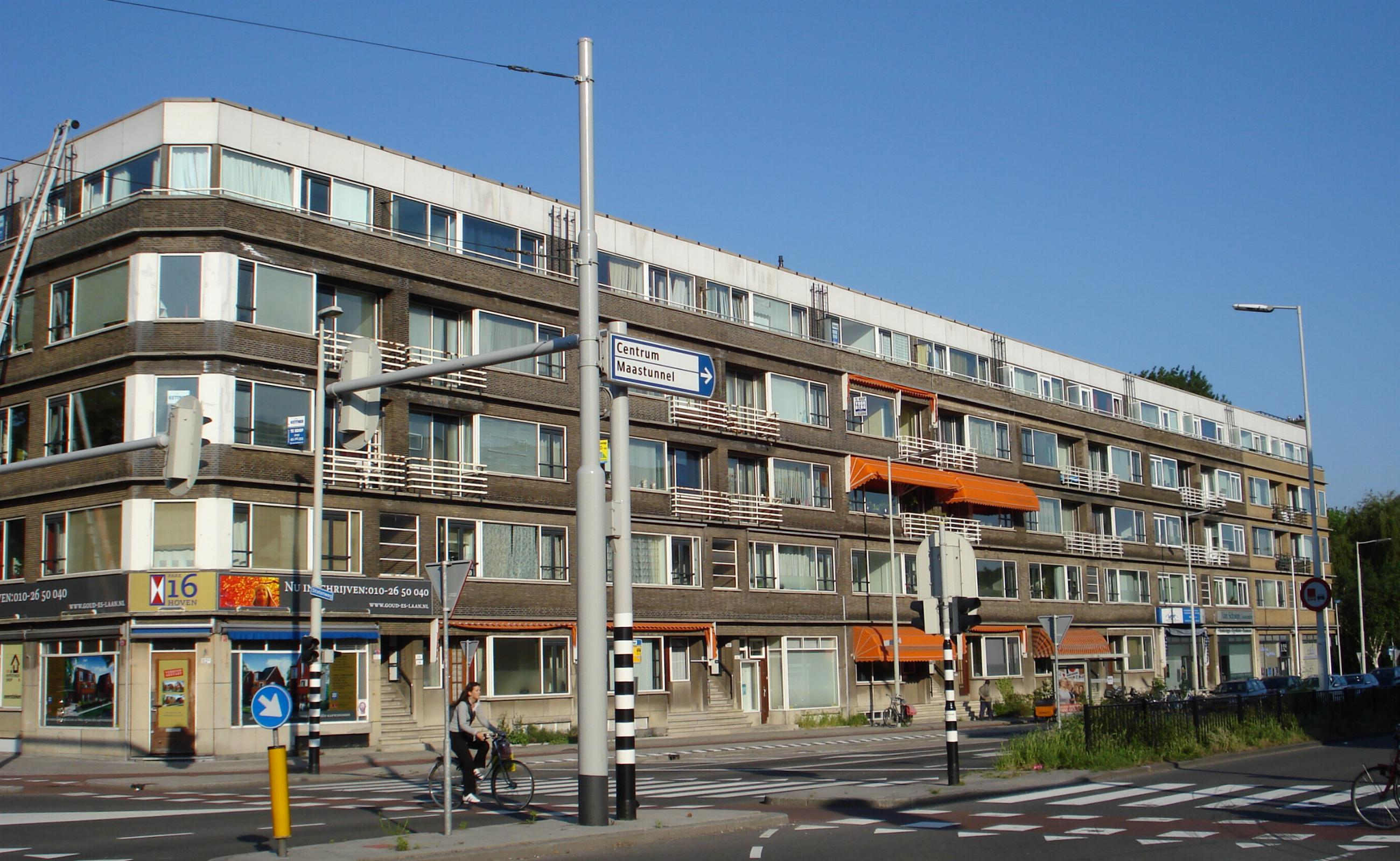 Rotterdam, Statenweg 112-134. Rijksmonument.